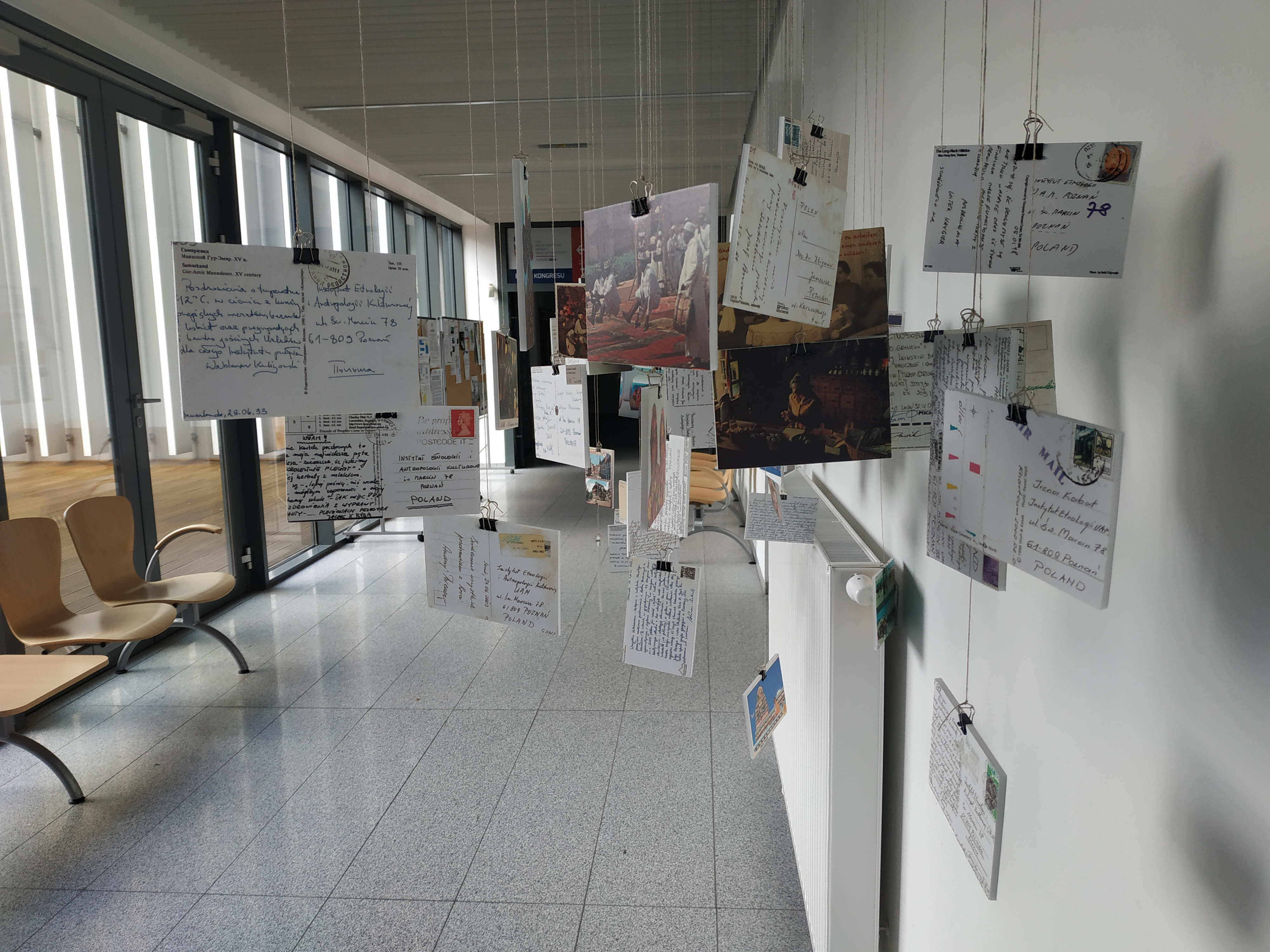 Wystawa zbioru pocztówek wysyłanych przez pracowników, doktorantów i studentów do Instytutu Antropologii i Etnologii UAM w Poznaniu podczas badań terenowych. Pocztówki gromadzone są w instytutowym archiwum.